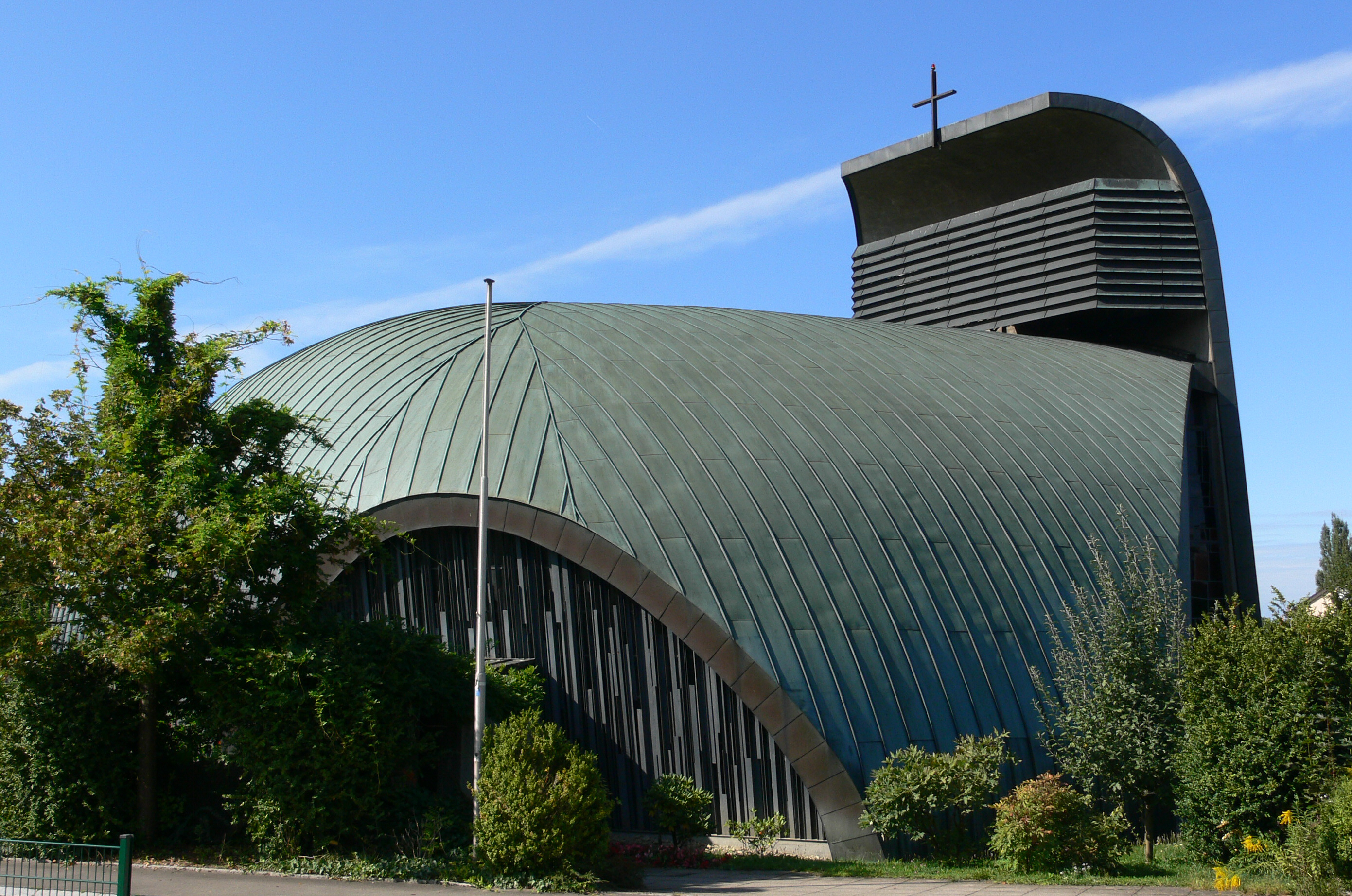 Friedrichshafen, Katholische Pfarrkirche Zum Guten Hirten, erbaut 1959–1962